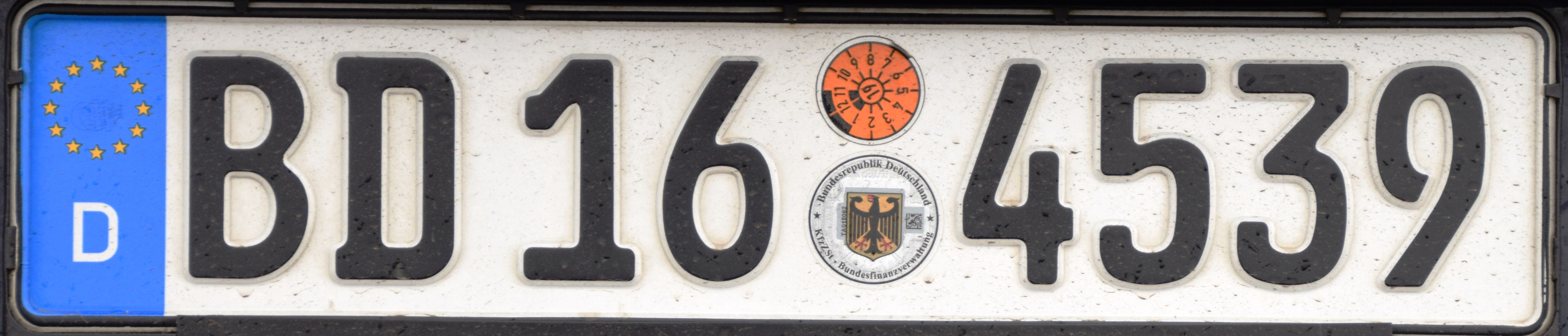 BD kentekenplaat Duitsland